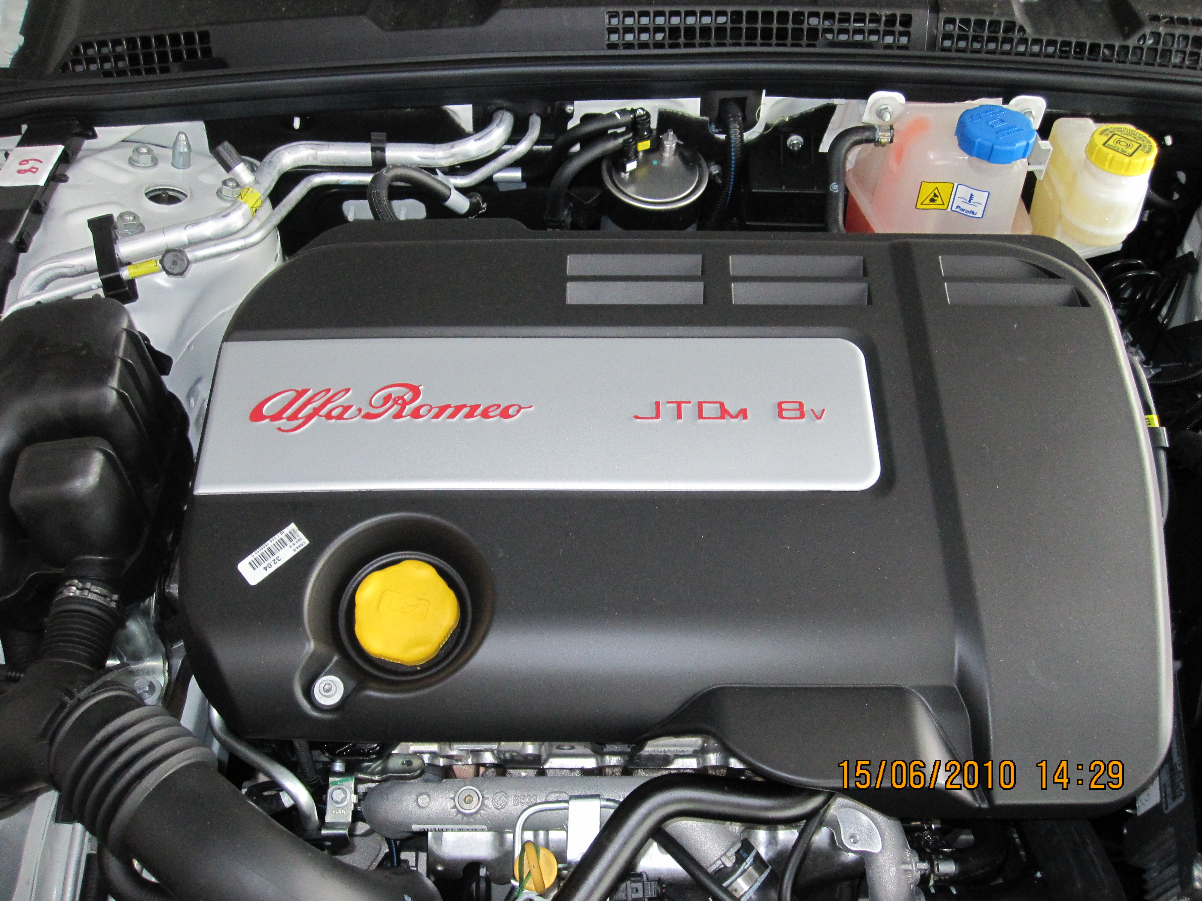 Motore Alfa Romeo JTDm installato in un'Alfa Romeo 159